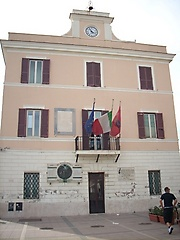 Stazione antimalarica di Fiumicino